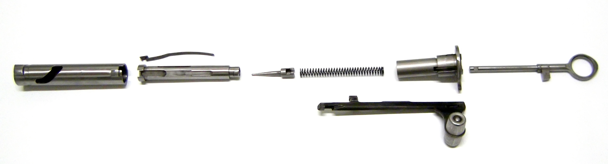 Culasse démontée du Zkf55